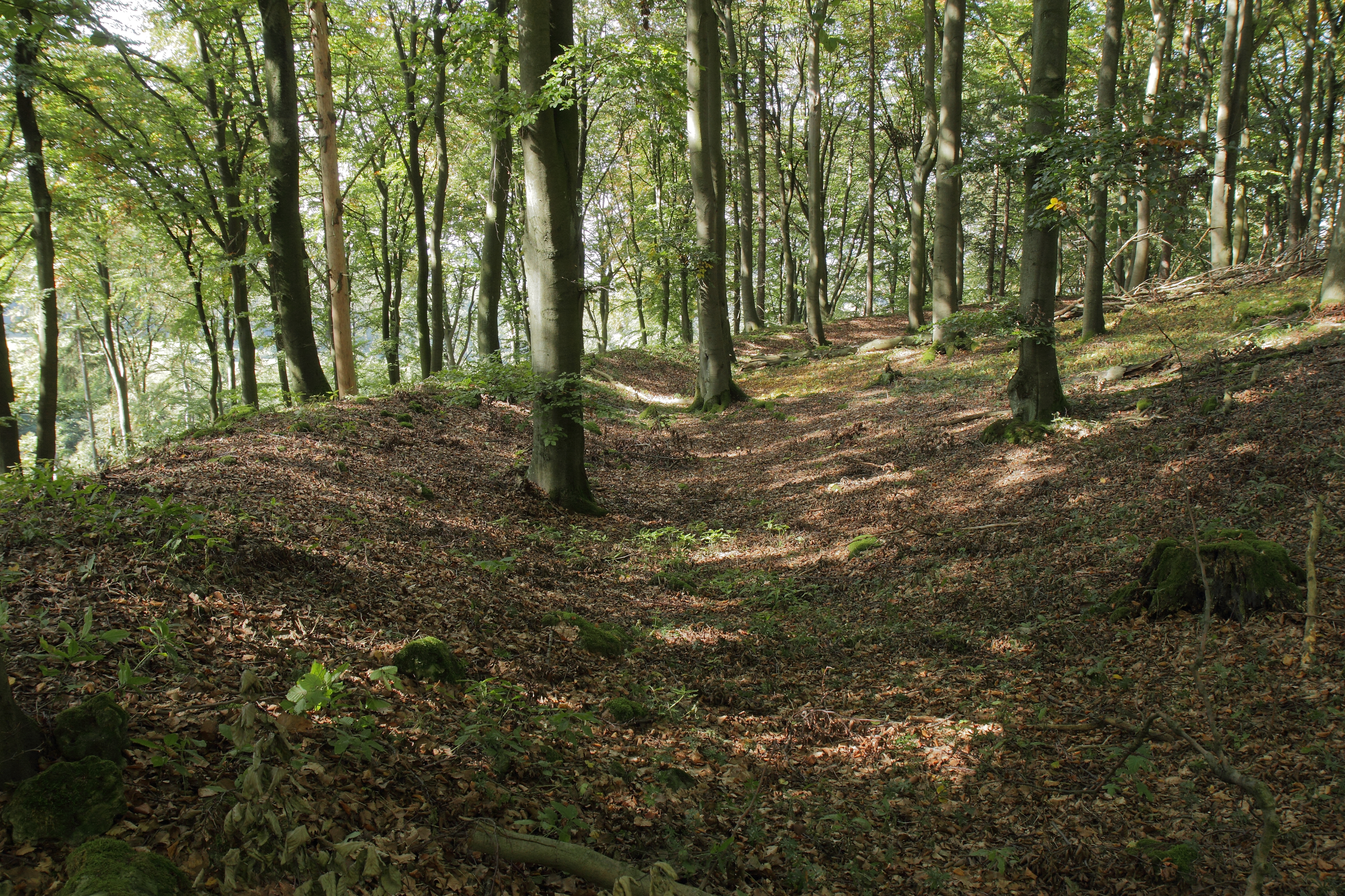 Ringwall Buchenberg - Ansicht des südwestlichen Wallabschnittes